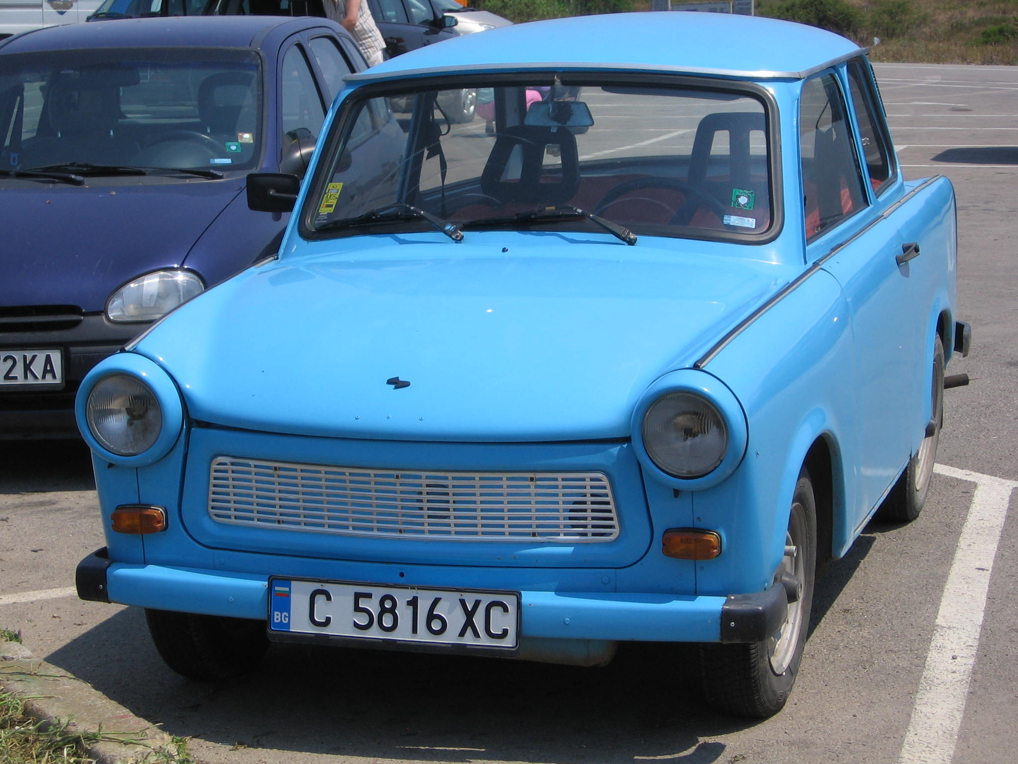 Blue Trabant 601 in Bulgaria, 2007.